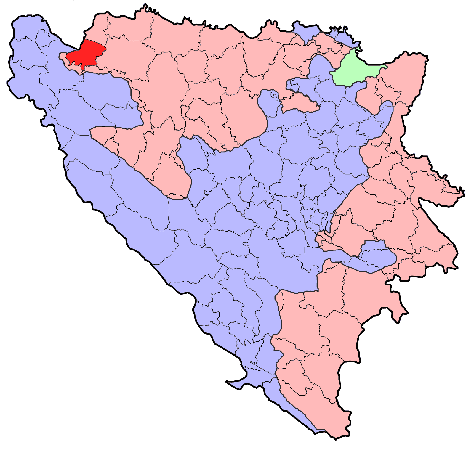 Prikaz općine Bosanski Novi u Bosni i Hercegovini